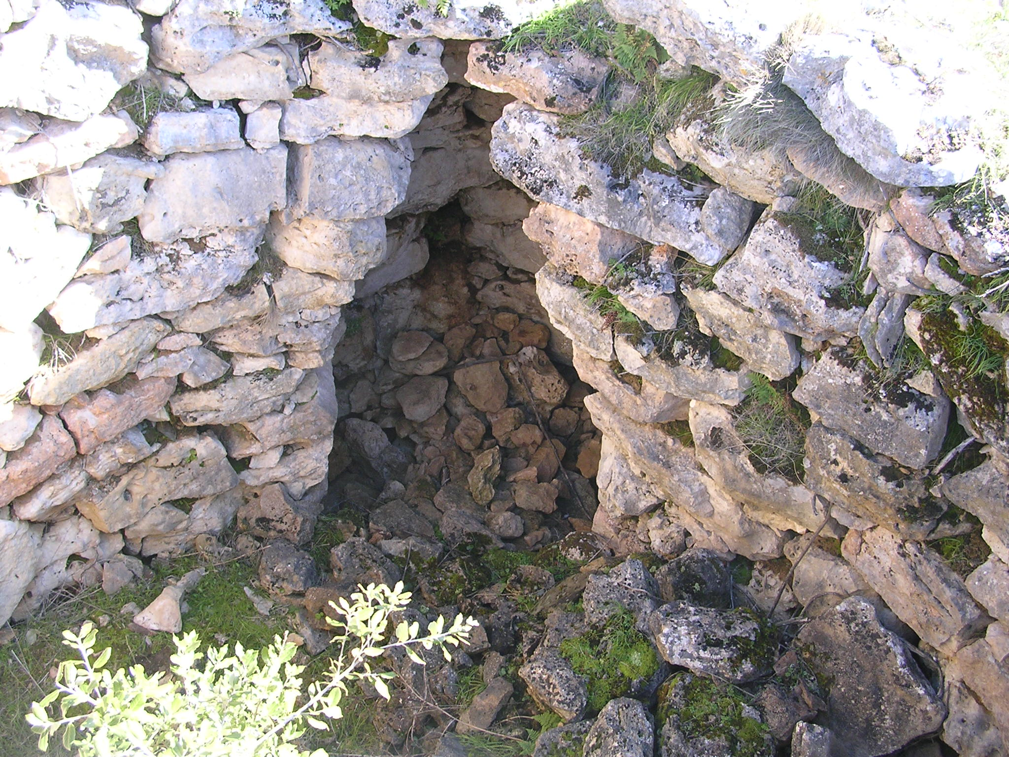 Particolare della nicchia est del Nuraghe Pranu di Ulassai